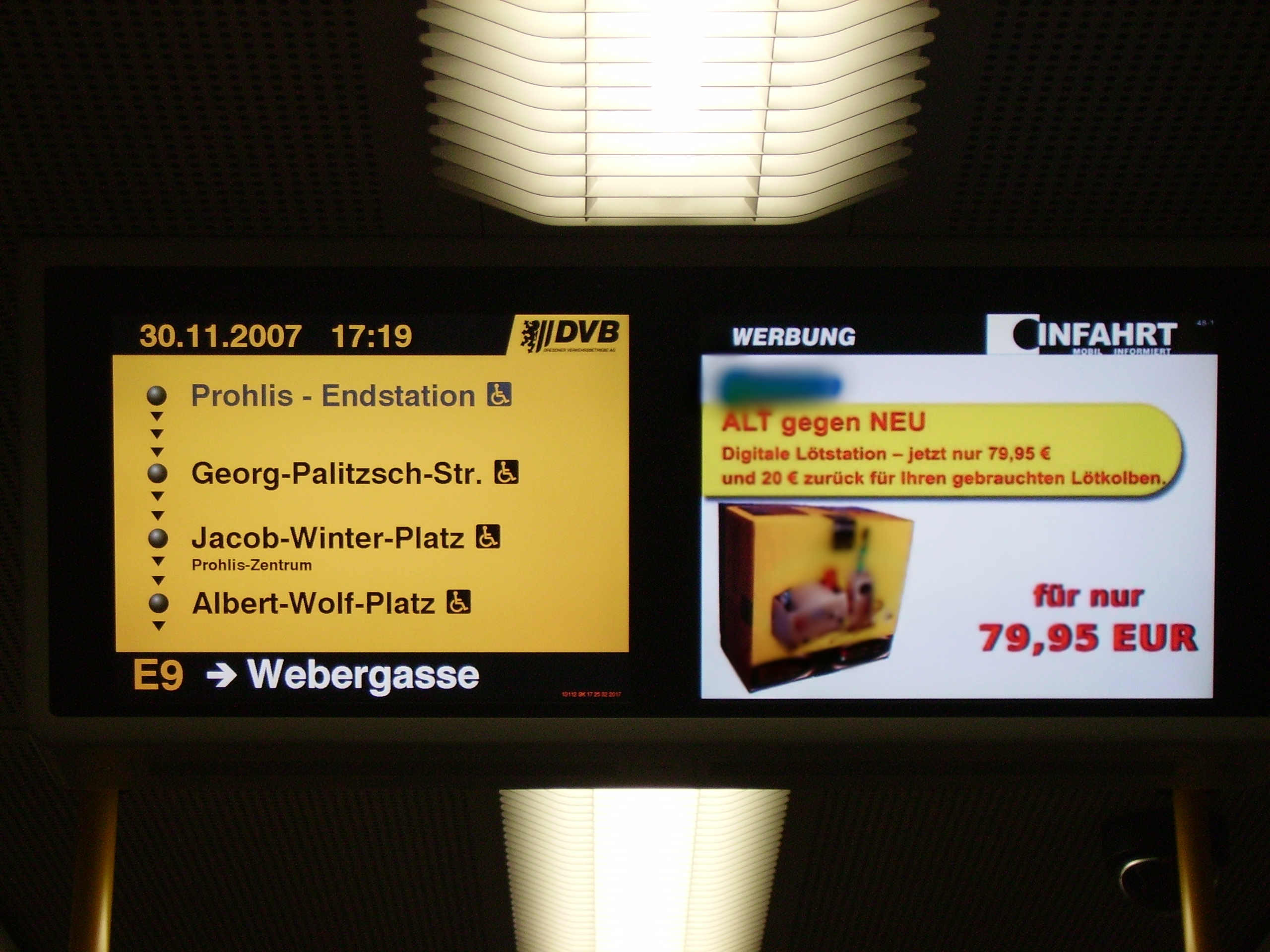 Das Fahrgastinformationssystem in einem NGTD8DD in Dresden Das Bild zeigt rechts Werbung (wechselnd, teilweise animiert) und links die aktuelle (oben) und die nächsten Haltestellen (darunter in Pfeilrichtung). Im Bild nicht sichtbar: Die linke Seite zeigt auch Informationen über die nächste Haltestelle an (z.B. Umsteigemöglichkeitem). Die beiden linken Infoseiten alternieren. Links unten wird die Endhaltestelle (hier die "Webergasse" nahe dem Postplatz) angezeigt, ebenso der Status "Wagen hält" in Weiß auf rotem Hintergrund (im Bild nicht zu sehen).